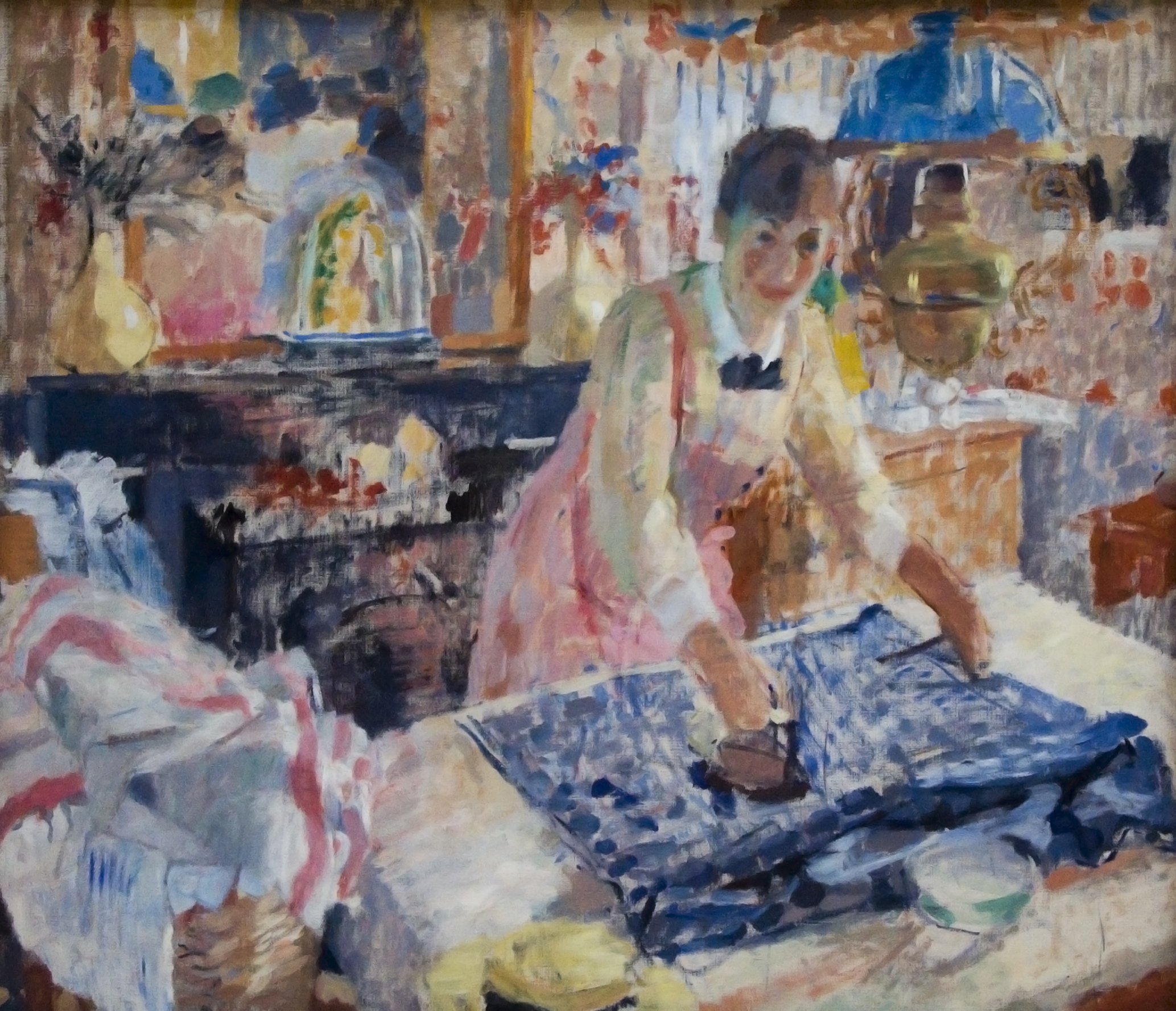 Rik Wouters (1882-1916) - De strijkster (1912) in het Koninklijk Museum voor Schone Kunsten te Antwerpen